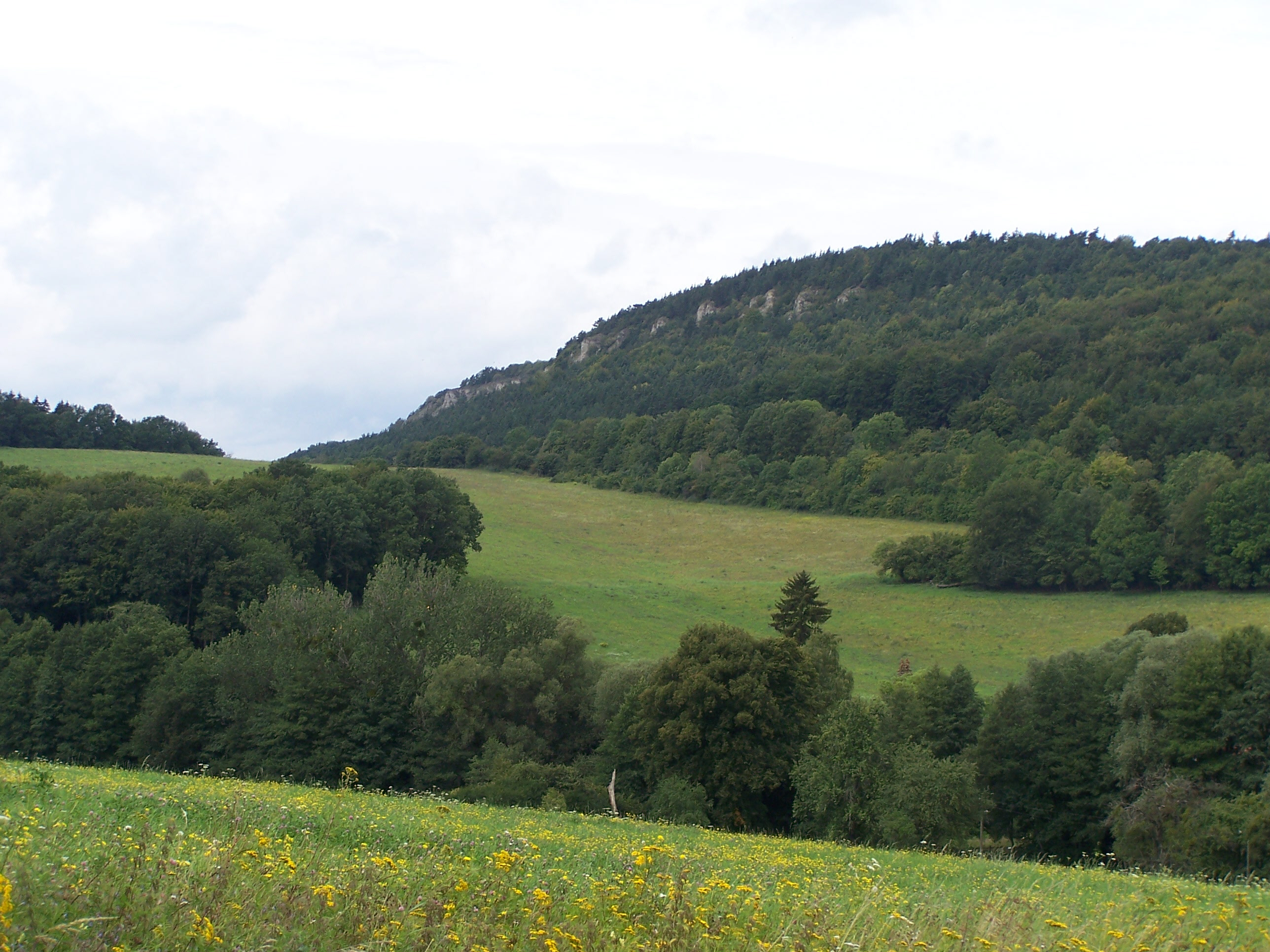 Landschaftsidylle bei Burbach - Blick zum Kleinen Hörselberg.